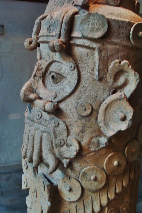 Escultura de Dzahui, dios mixteco de la lluvia. Fue realizada en cerámica. Procede del istmo de Tehuantepec. Período posclásico. Colección del MNA de la Ciudad de México.